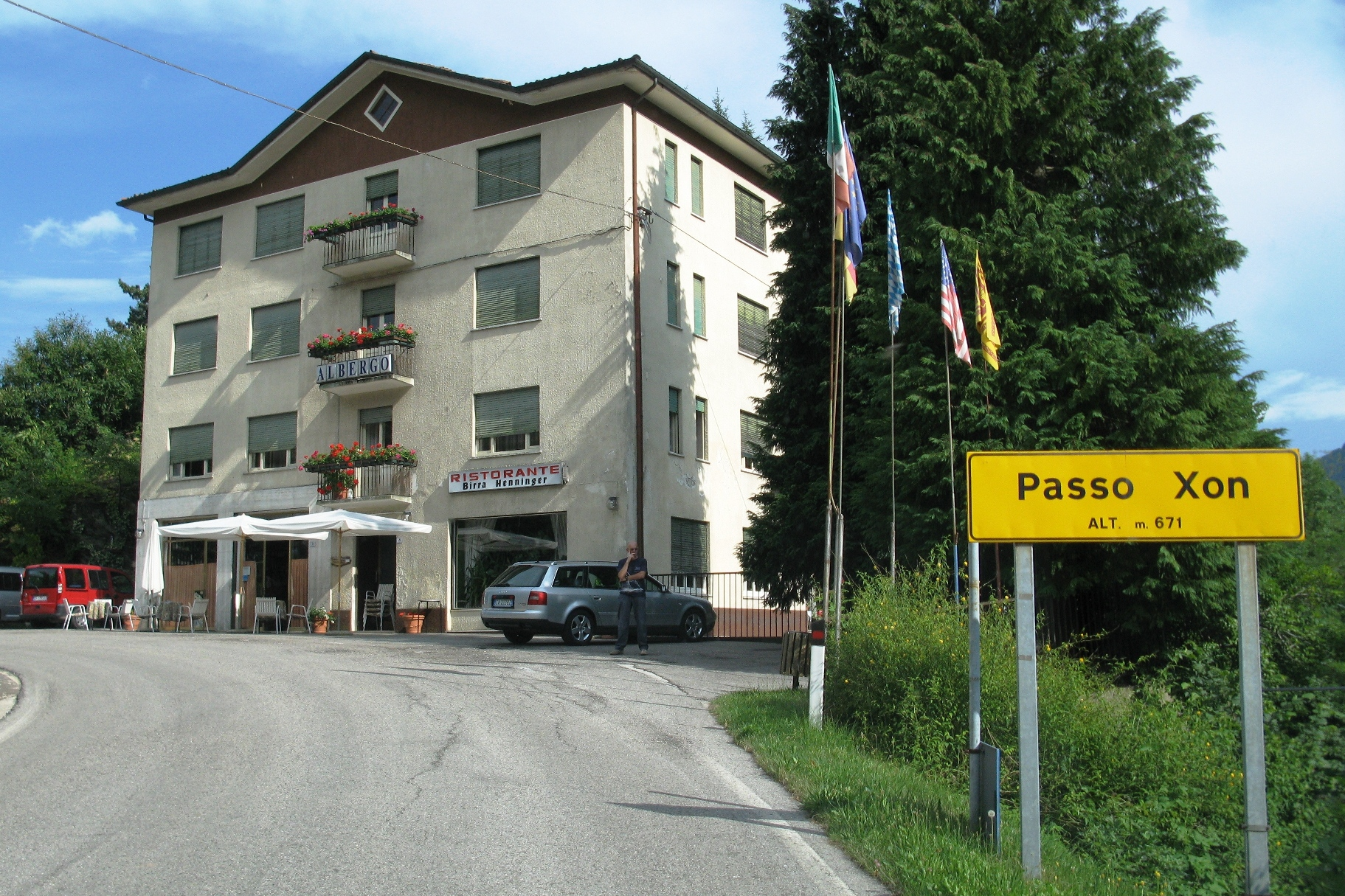 De Passo Xon mat der Auberge. Kategorie:Collen an den Alpen